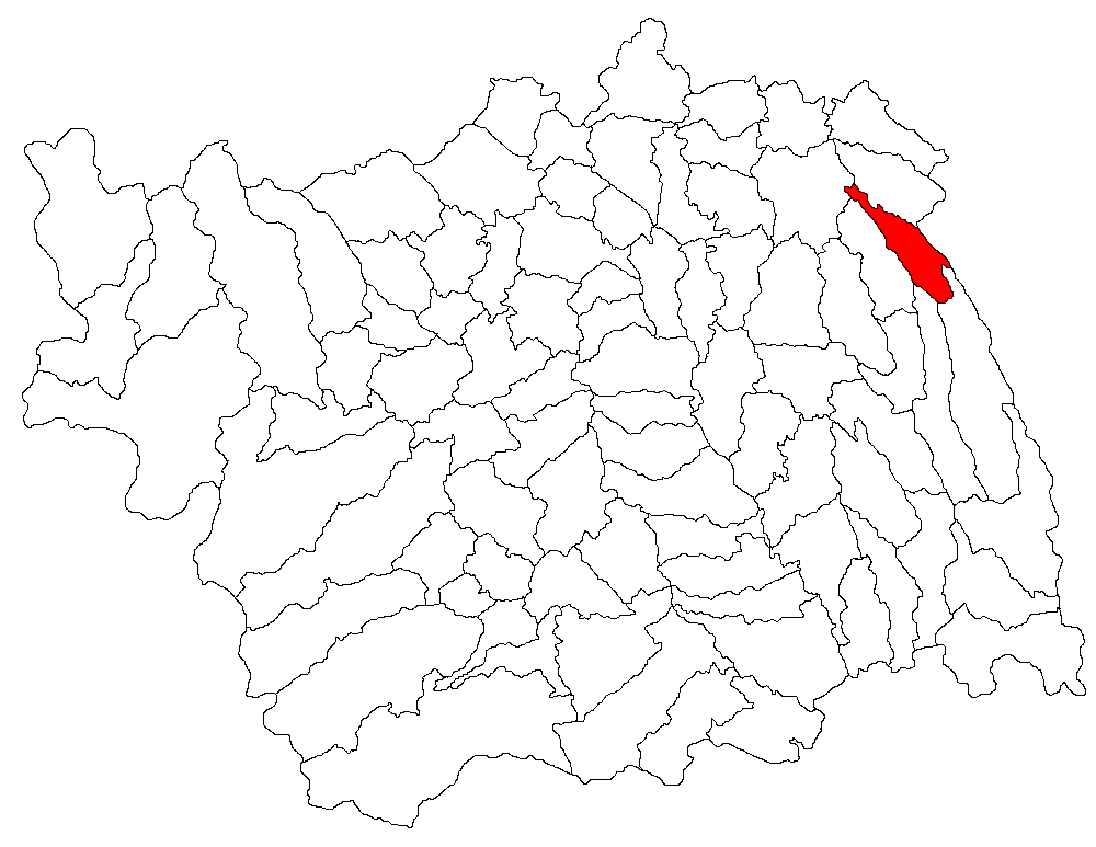 Categorie:Hărţi ale judeţului Bacău